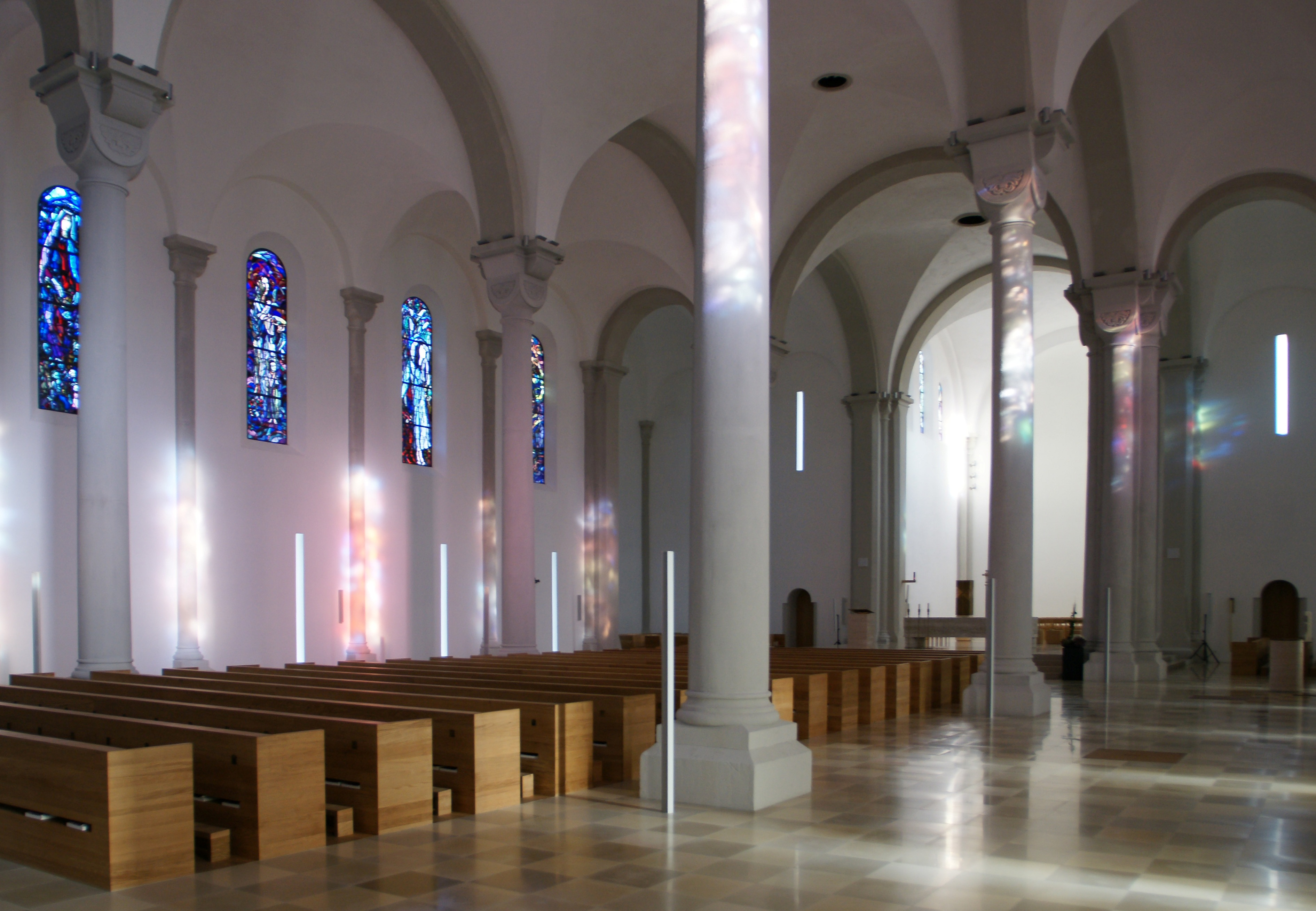 neue Pfarrkirche hl. Ulrich im heutigen Ortszentrum von Götzis. 1862-1865 nach Plan von "Anton Geppert" durch Baumeister J.Wilhelm erbaut. Glasmalereien ausgeführt von der Tiroler Glasmalereianstalt. 2008 generalsaniert.